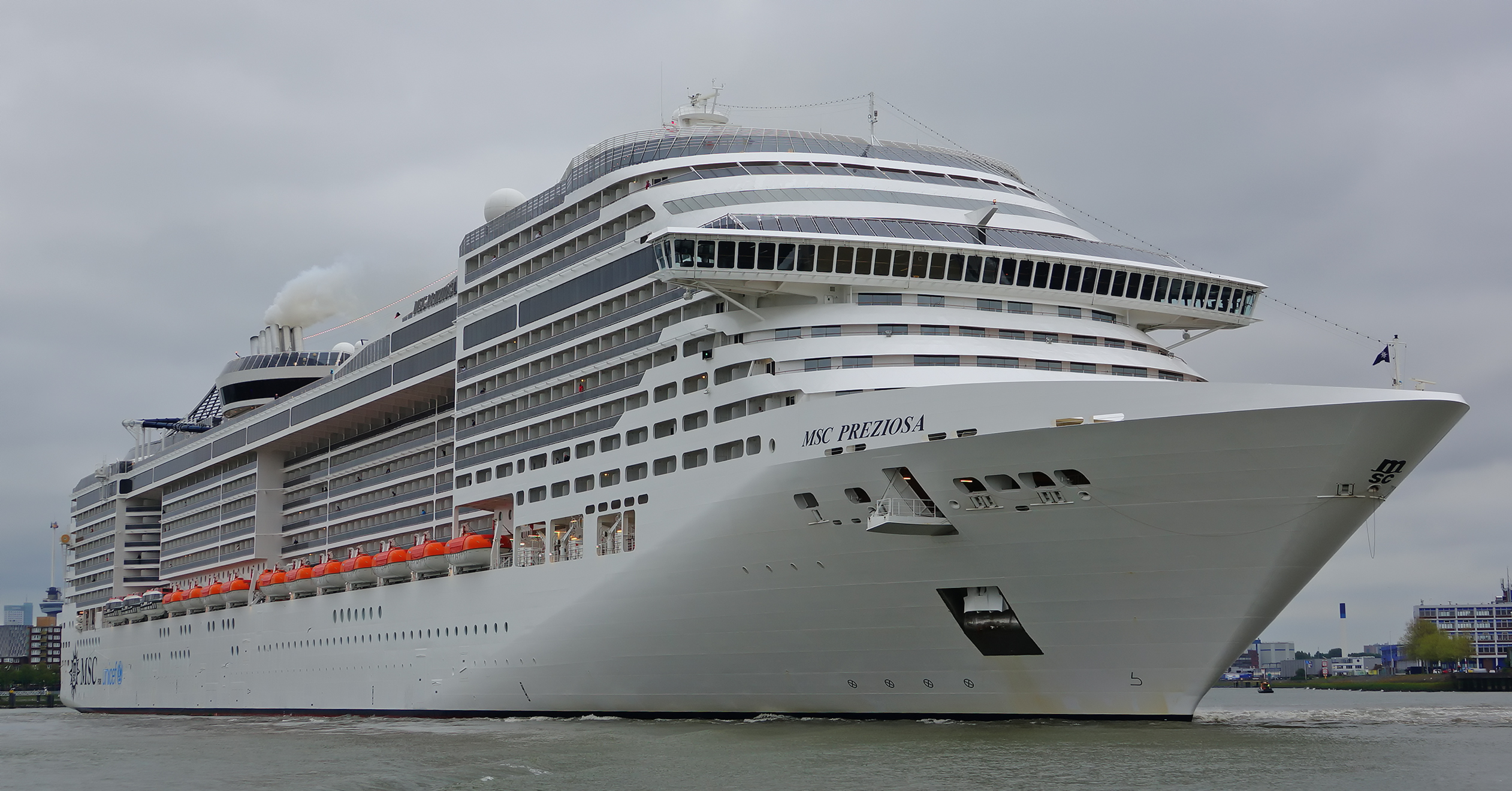 Nieuwe Maas Rotterdam 5-5-2017